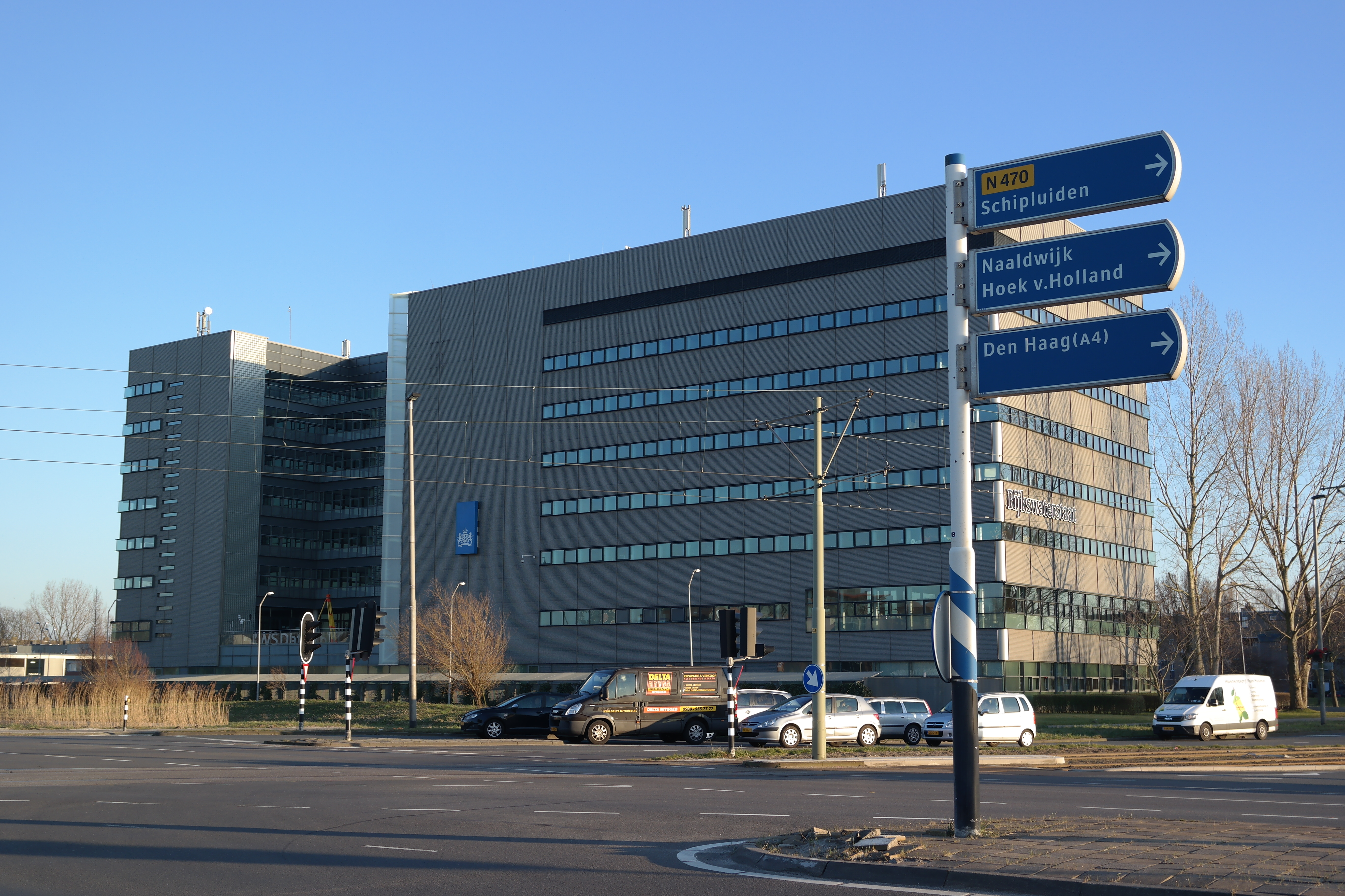 Het pand van Rijkswaterstaat aan de Derde Werelddreef 1 in Delft.